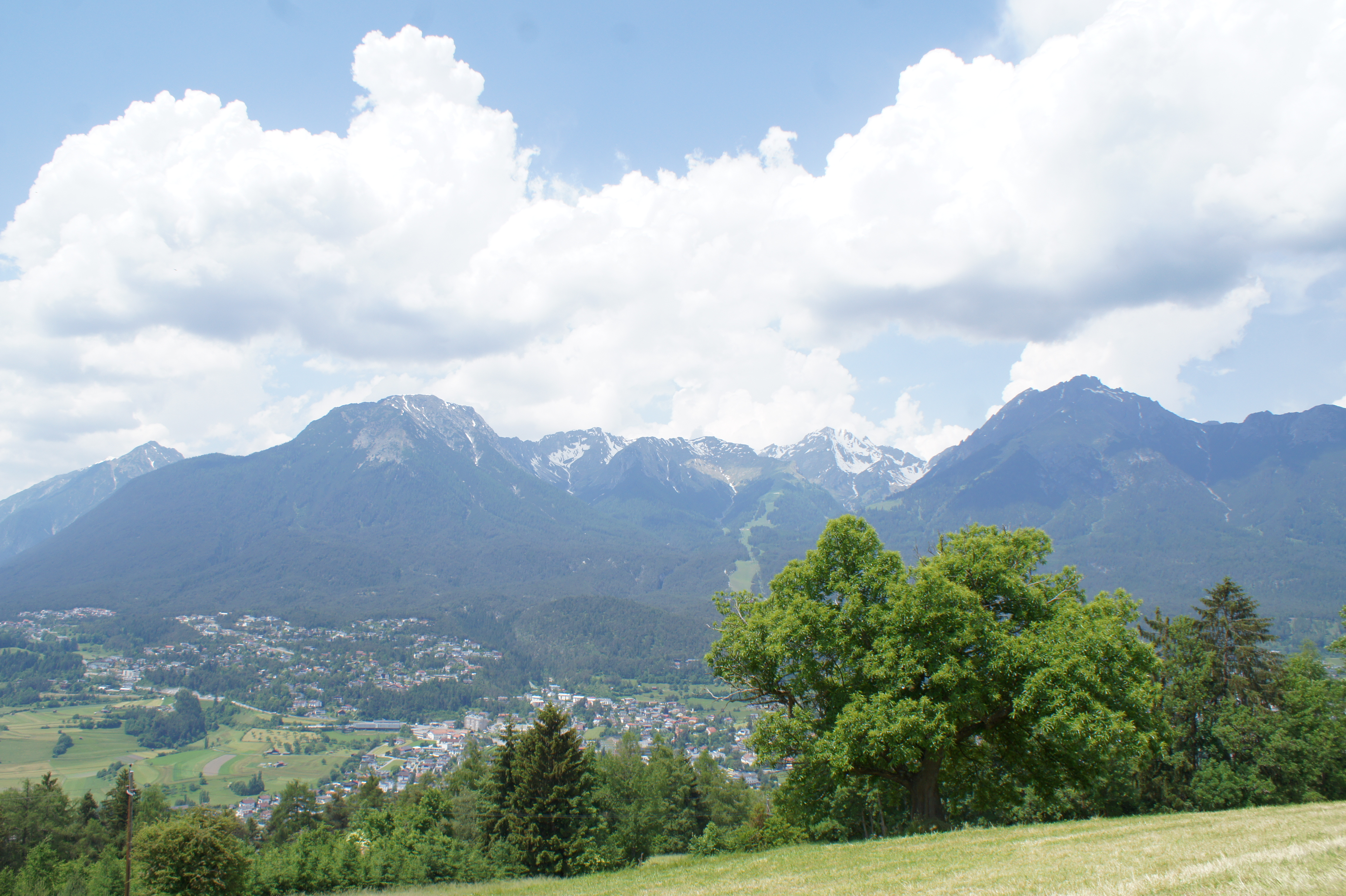 Edelkastanie nordwestlich von Karrösten This media shows the natural monument in the Tyrol with the ID ND_2_11.